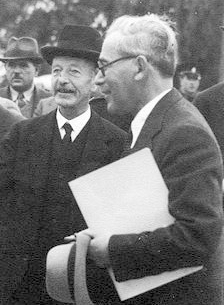 he:יצחק וולקני-אלעזרי וhe:הנציב העליון סר he:ארתור ווקופ ב-he:1935